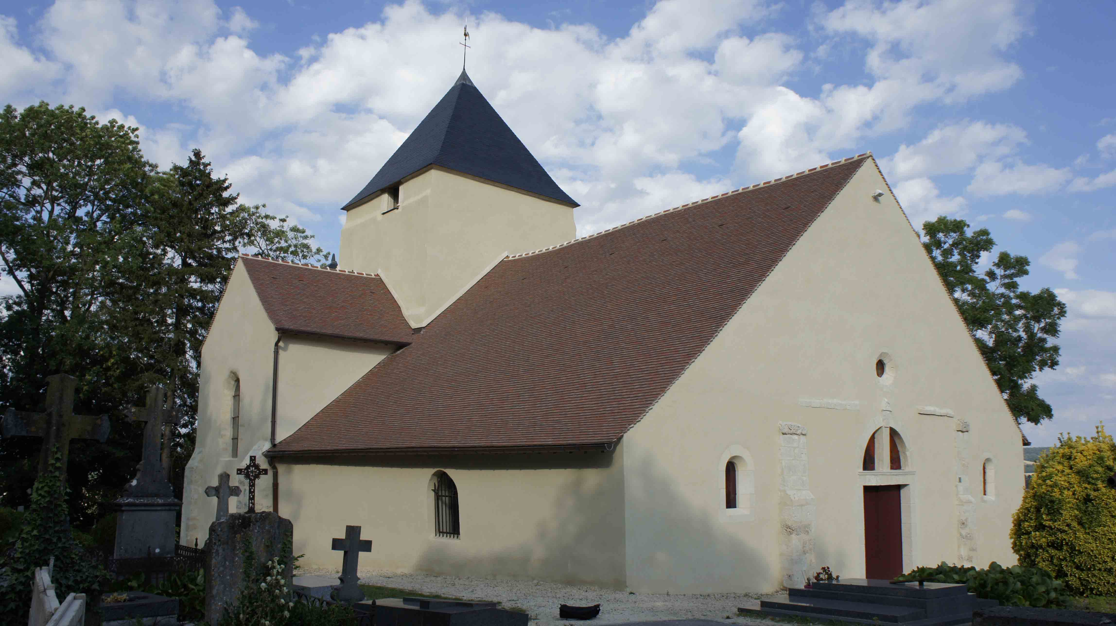 vue de l'Église d'Écueil en surplond du village avec le cimetière autour.